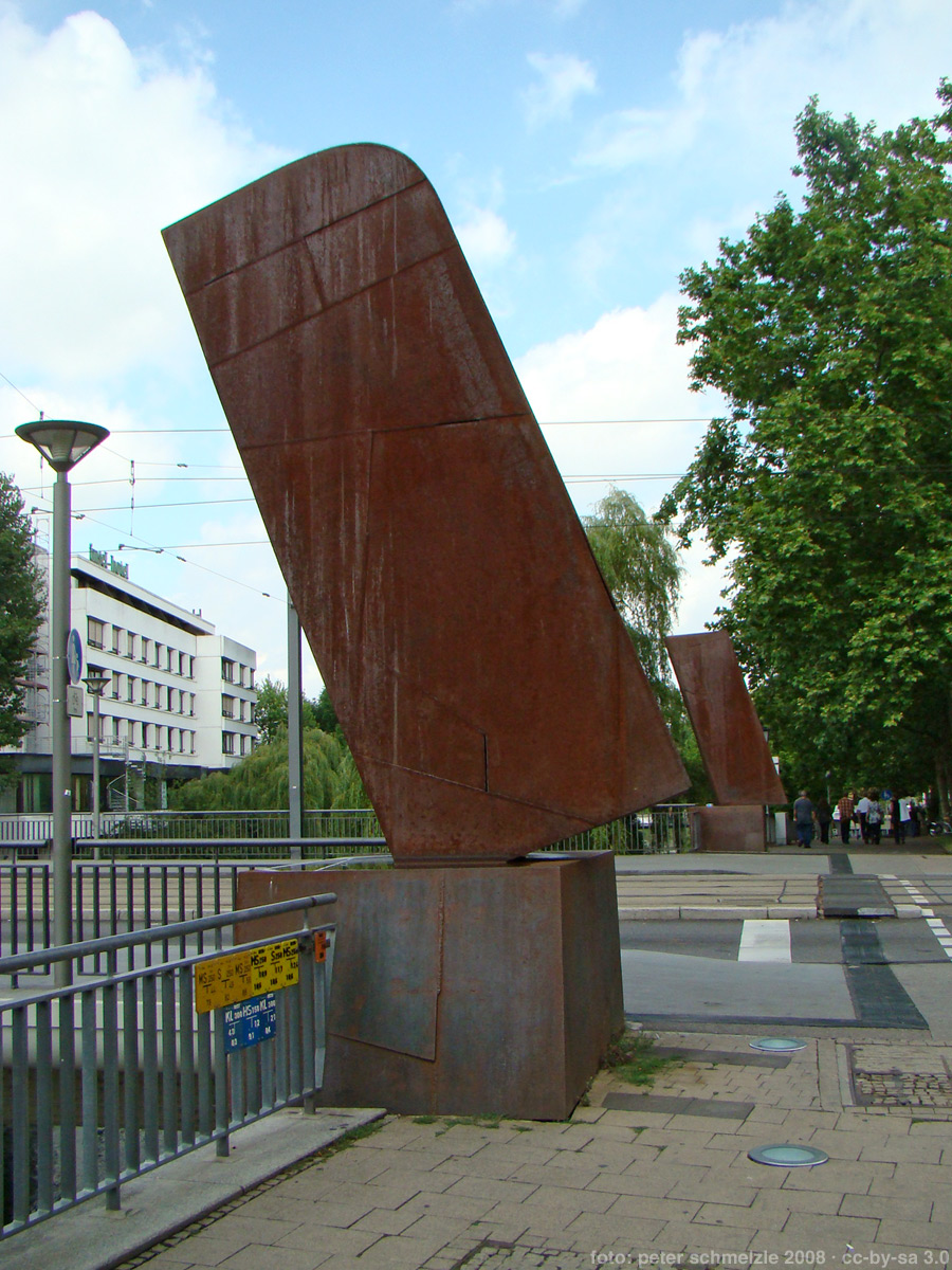 Zwei von vier "Brückenköpfen" von Franz Bernhard an der Friedrich-Ebert-Brücke in Heilbronn, links im Hintergrund das Insel-Hotel